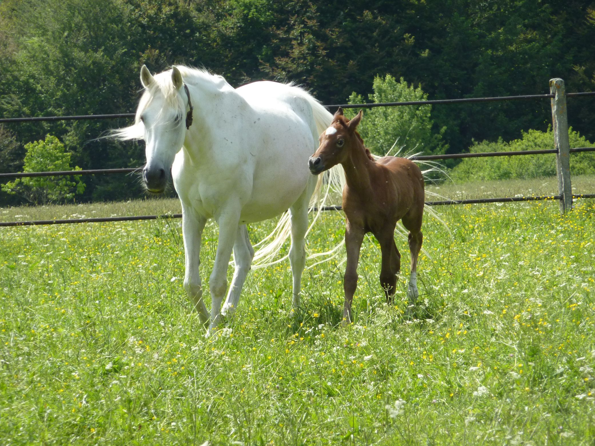 Araberstute mit Fohlen in Marbach